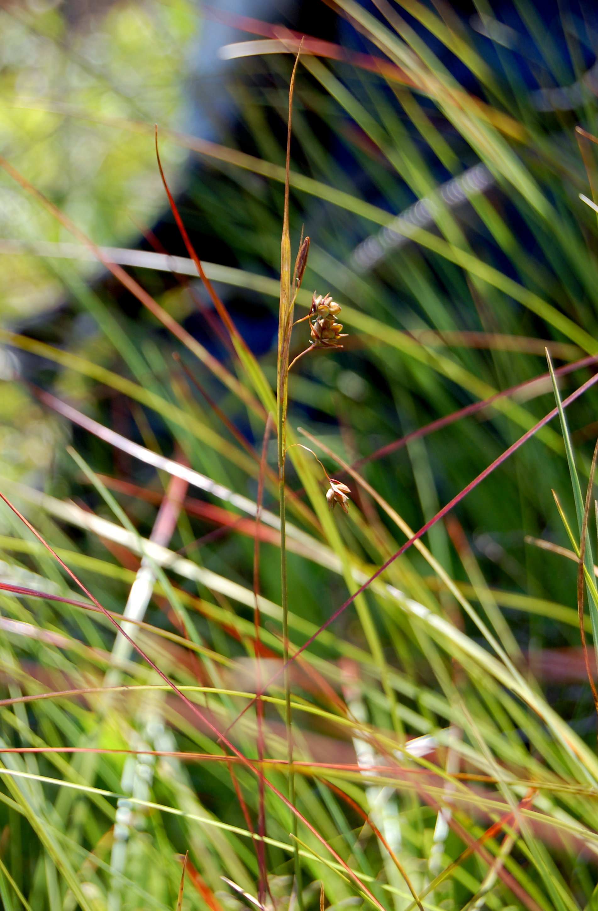 Carex magellanica